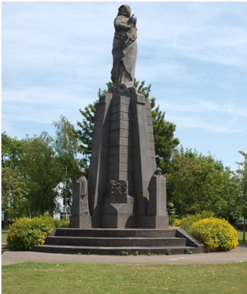 IJzermonument te Nieuwpoort (1930). Beeldhouwer : Pieter-Jan Braecke